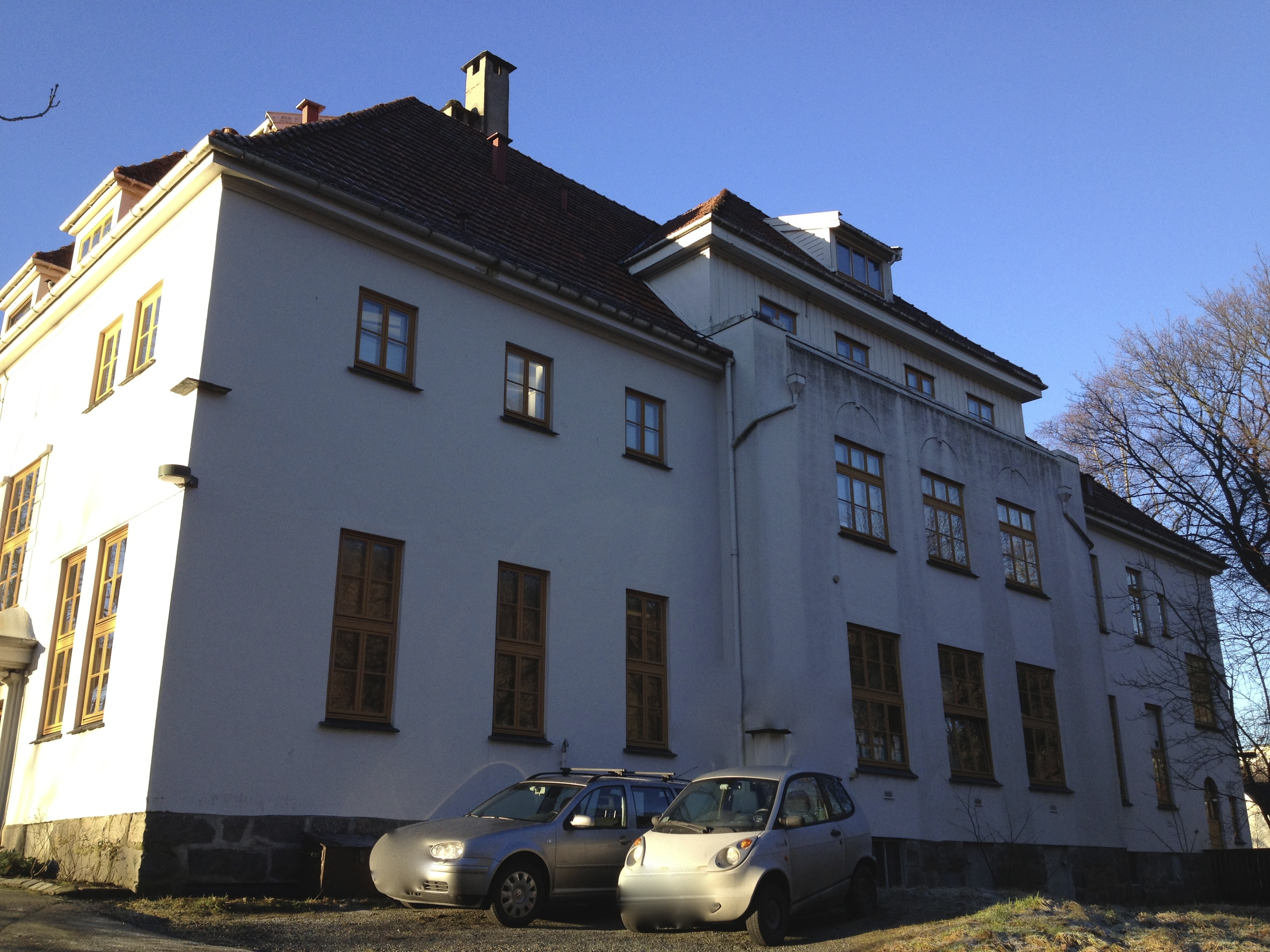 Barnehjemmet sett fra østsiden.